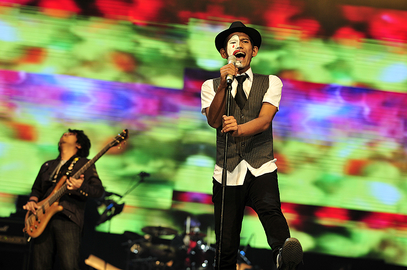 Anugerah Juara Lagu 23